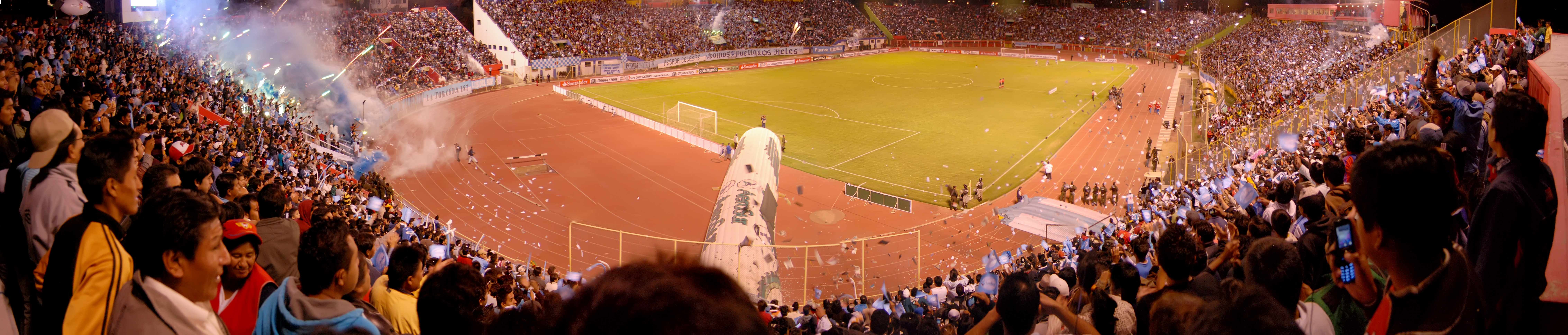 Hinchada del Club Aurora en la Copa Sudamericana 2011 en el Estadio Félix Capriles donde se observa un lleno completo.